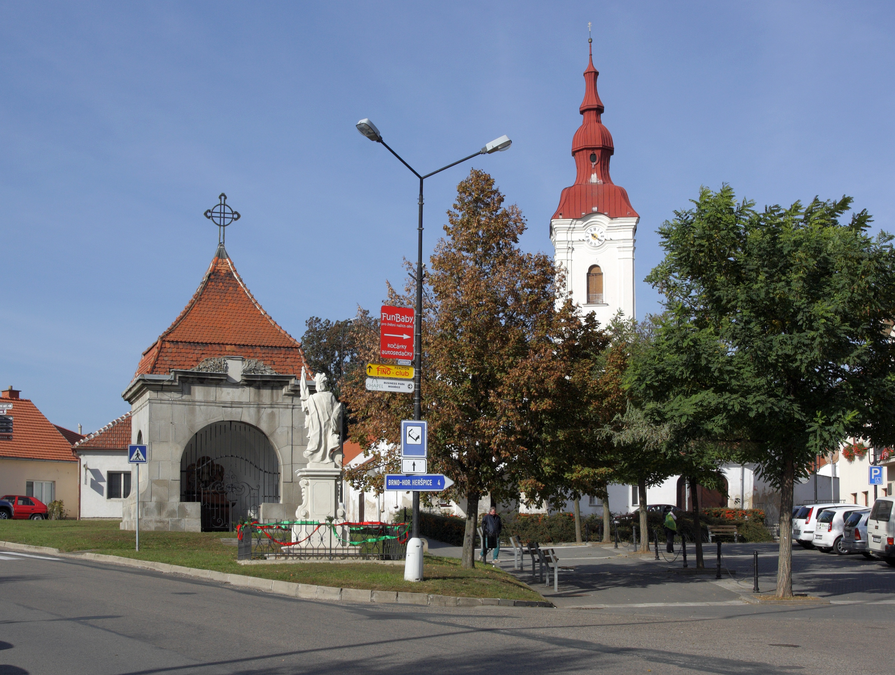 Modřice - náměstí Svobody. Vlevo kaple sv. Václava, před ní socha sv. Floriána. V pozadí věž kostela sv. Gottharda.